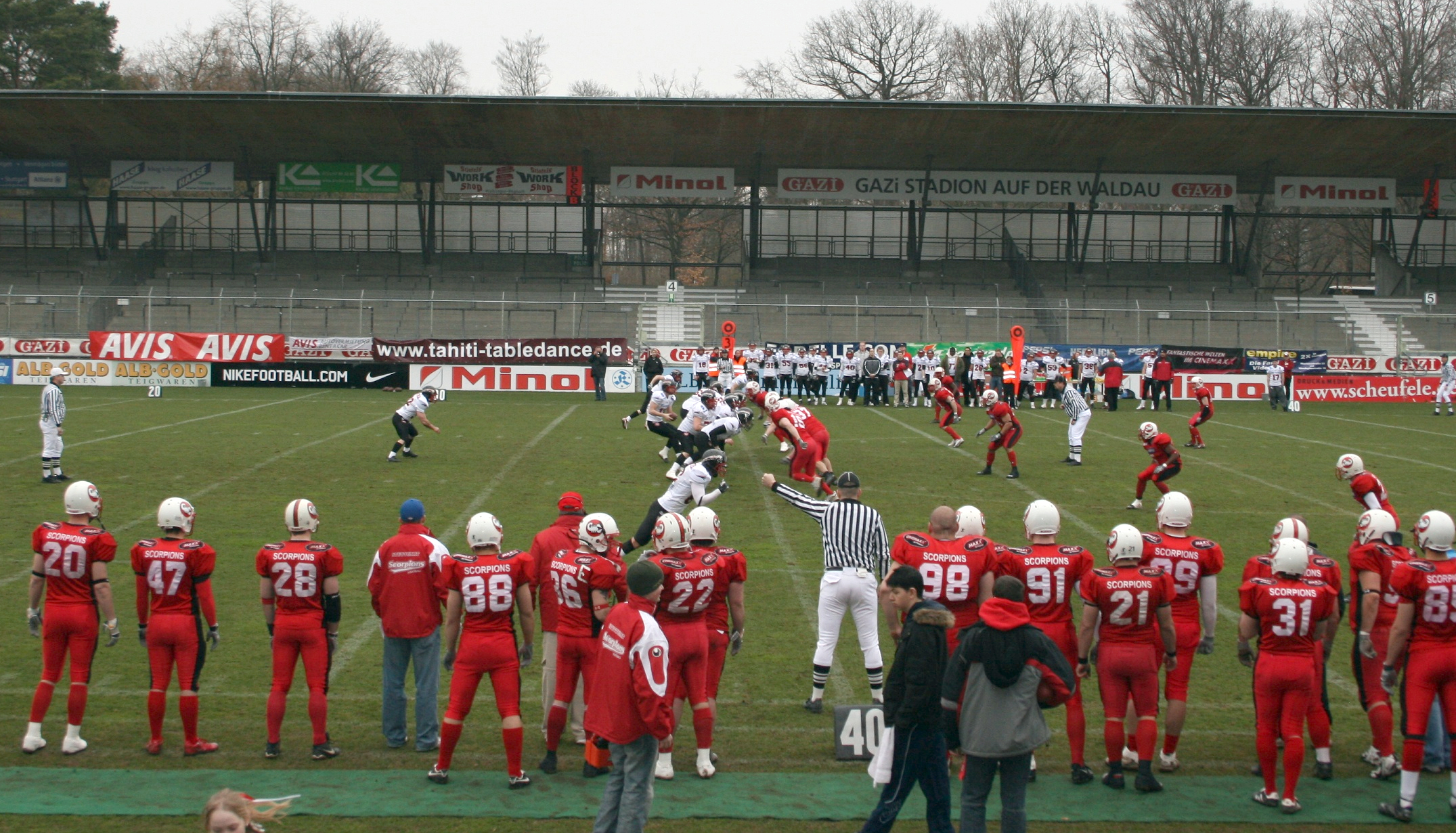 Stuttgart Scorpions vs. Düsseldorf Panther. Freundschaftsspiel 05.04.2008